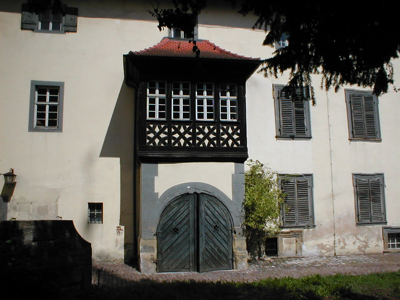 Bad Wimpfen, Wormser Hof